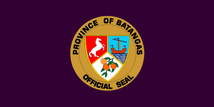 Dit materiaal is afkomstig van of en is door de auteur Jaume Ollé als GFDL beschikbaar gesteld, zie de toestemmingsemail. Hiermee vervallen de strictere voorwaarden in de disclaimers op de genoemde sites.Vrijgegeven bijdrage op Flags of the World van Jaume Olle. Zie deze verklaring op de Spaanstalige Wikipedia. GNU FDL